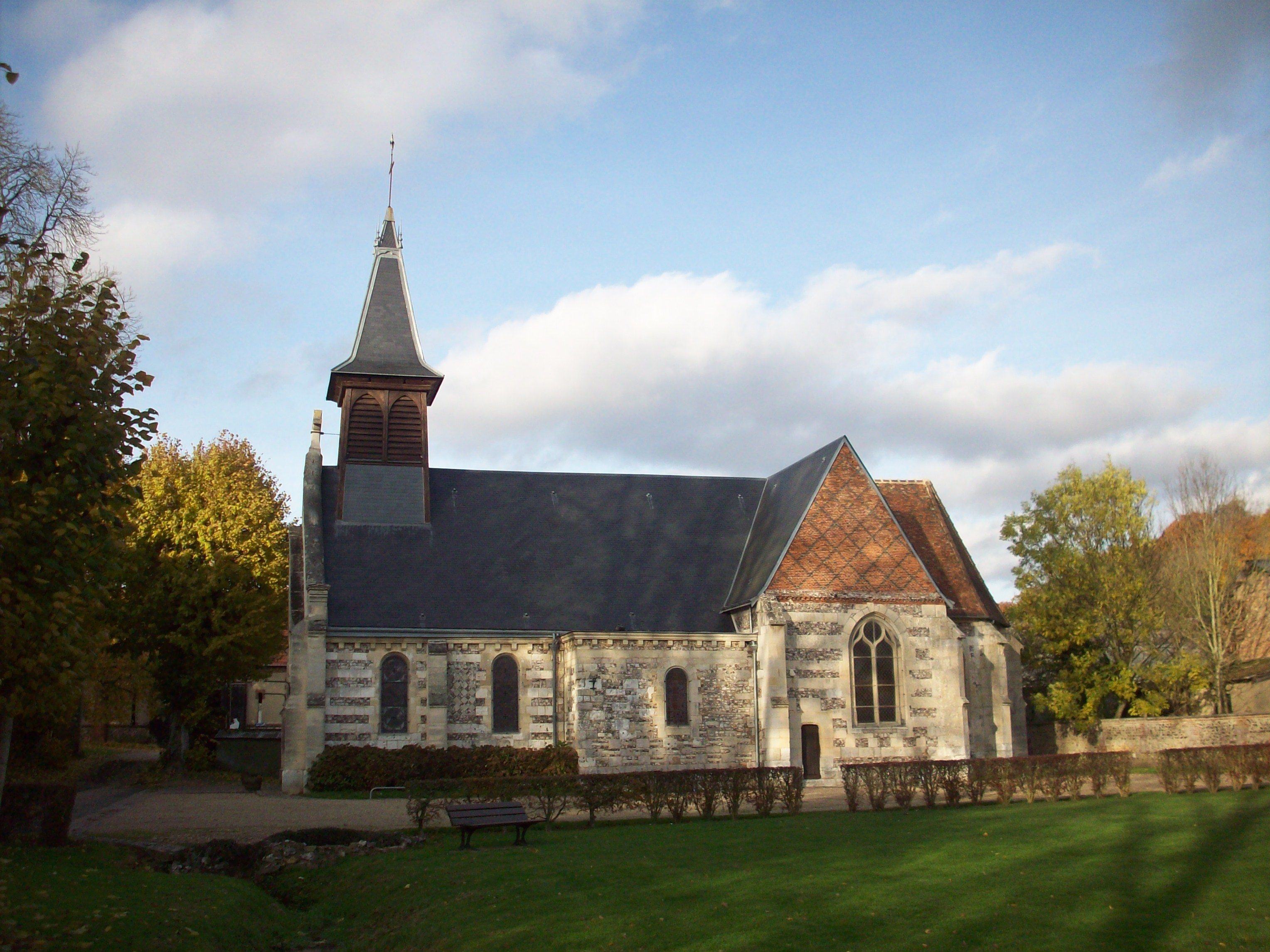 Eglise Saint-Martin de Lisors.